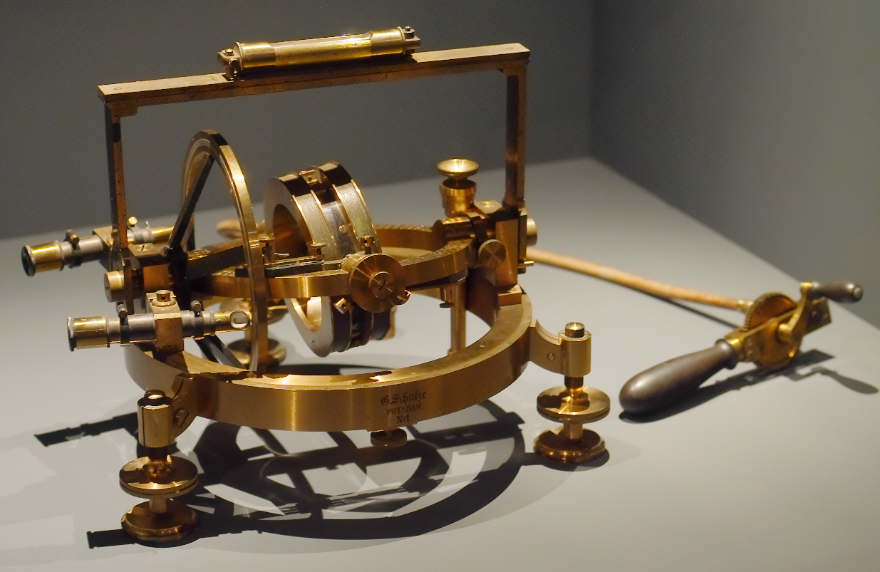 Erdinduktor Nummer 1 vom Hersteller G. Schulze in Potsdam (um 1900), Exponat der Ausstellung 2017 vom GeoForschungsZentrum Potsdam